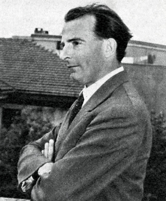 Ferdinando Previtali